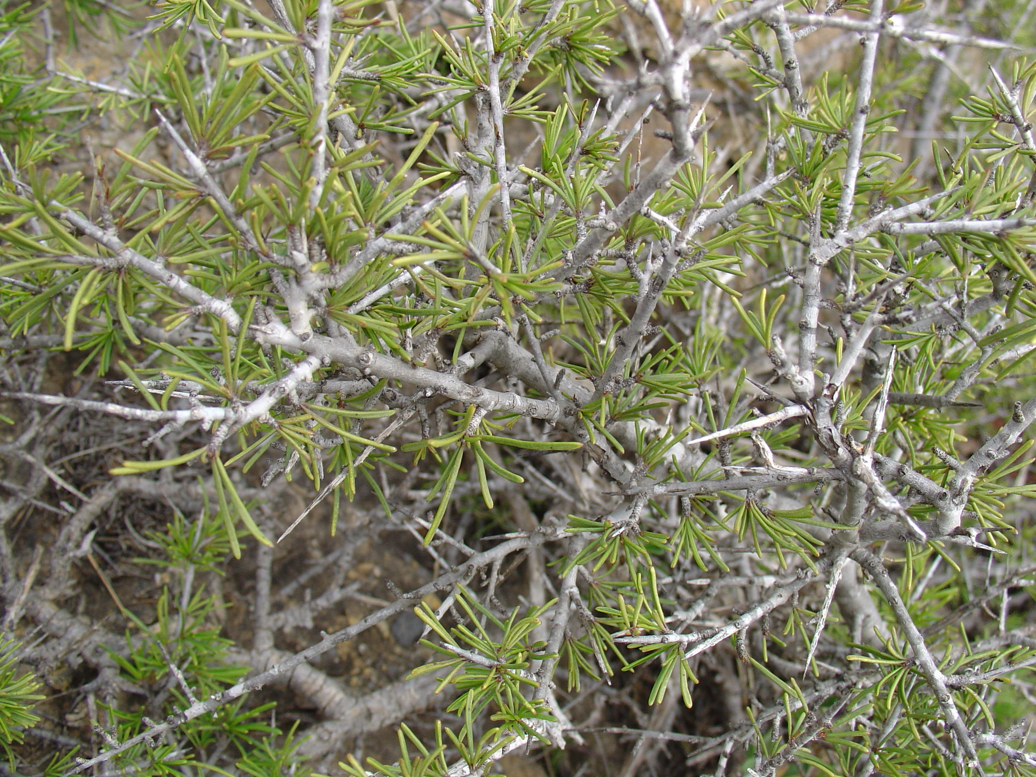 Rhamnus lycioides o espino negro procedente de Sª del Roldán, Cartagena, Murcia, Spain